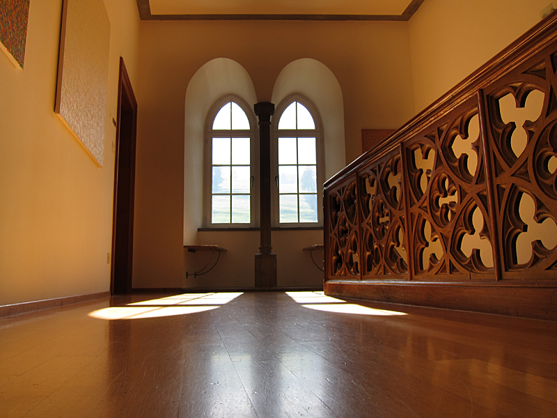 Schloss Wartensee in Rorschacherberg: Blick aus einem Fenster im westlichen Wohnturm nach Süden